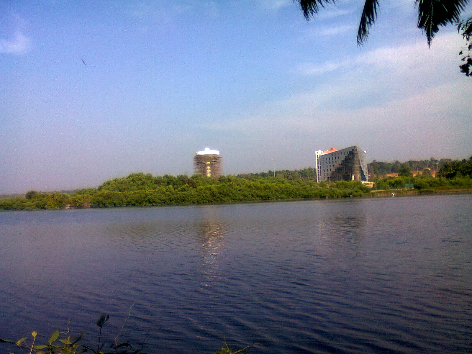 Info park ,Kundara,kollam , kerala